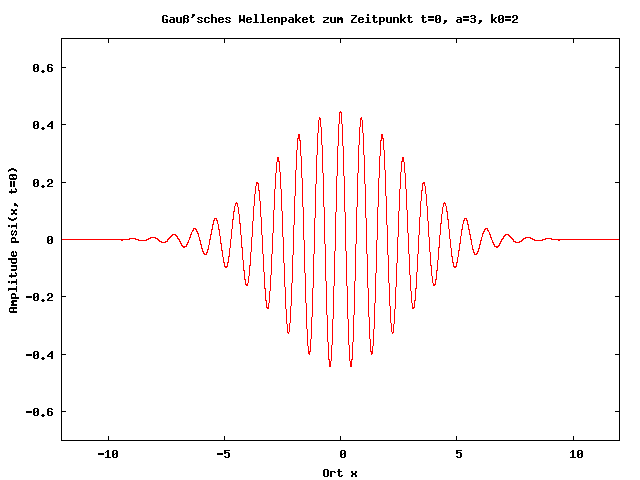 Gauß-Paket